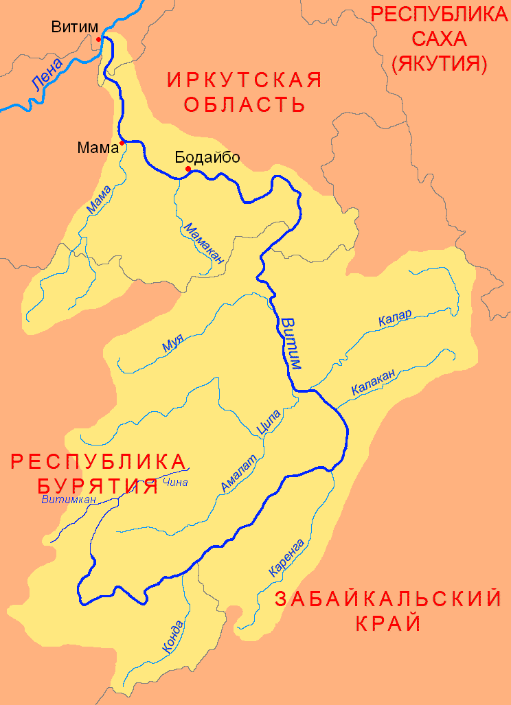 Схема бассейна реки Витим